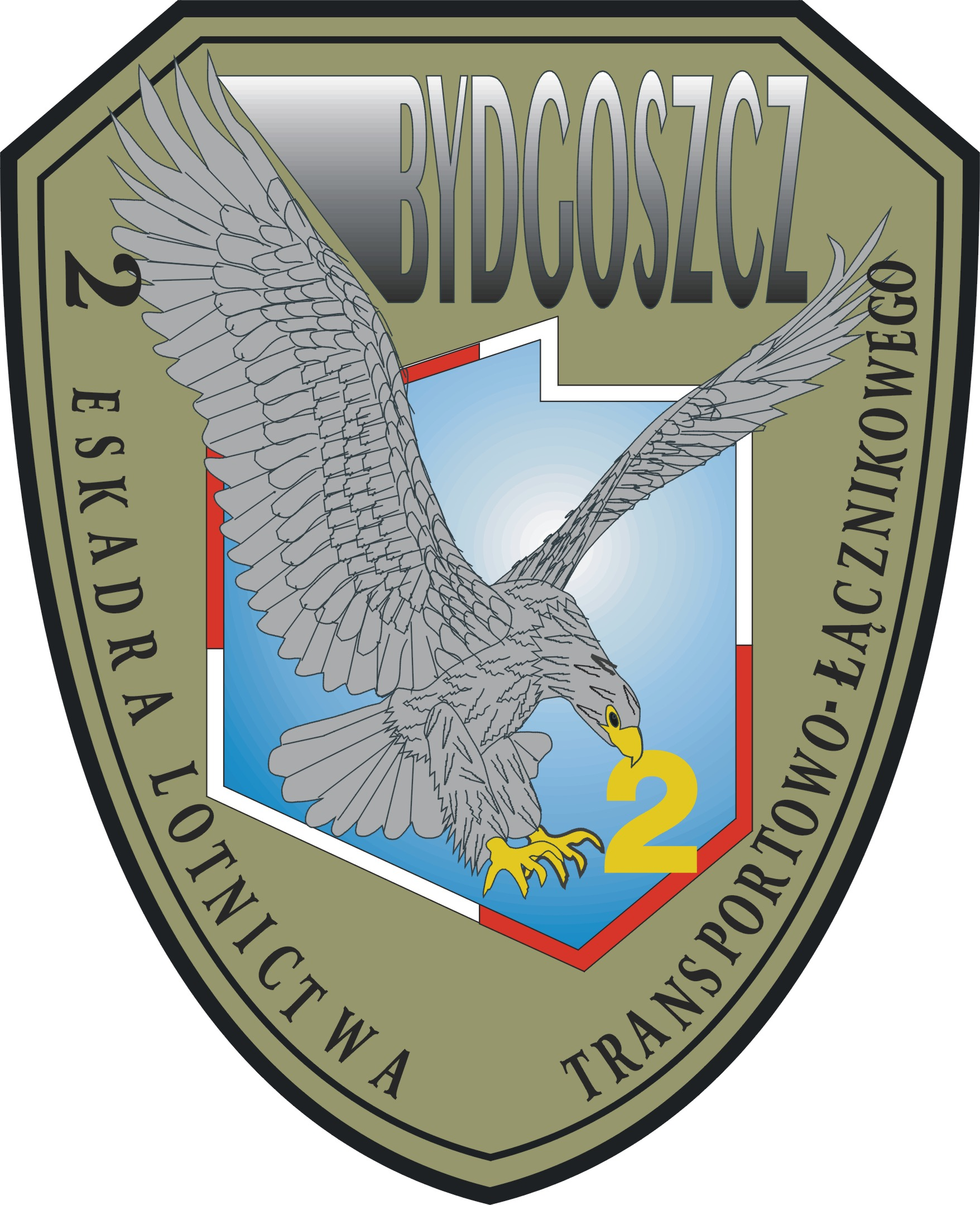 2. Eskadra Lotnictwa Transportowo-Łącznikowego w Bydgoszczy